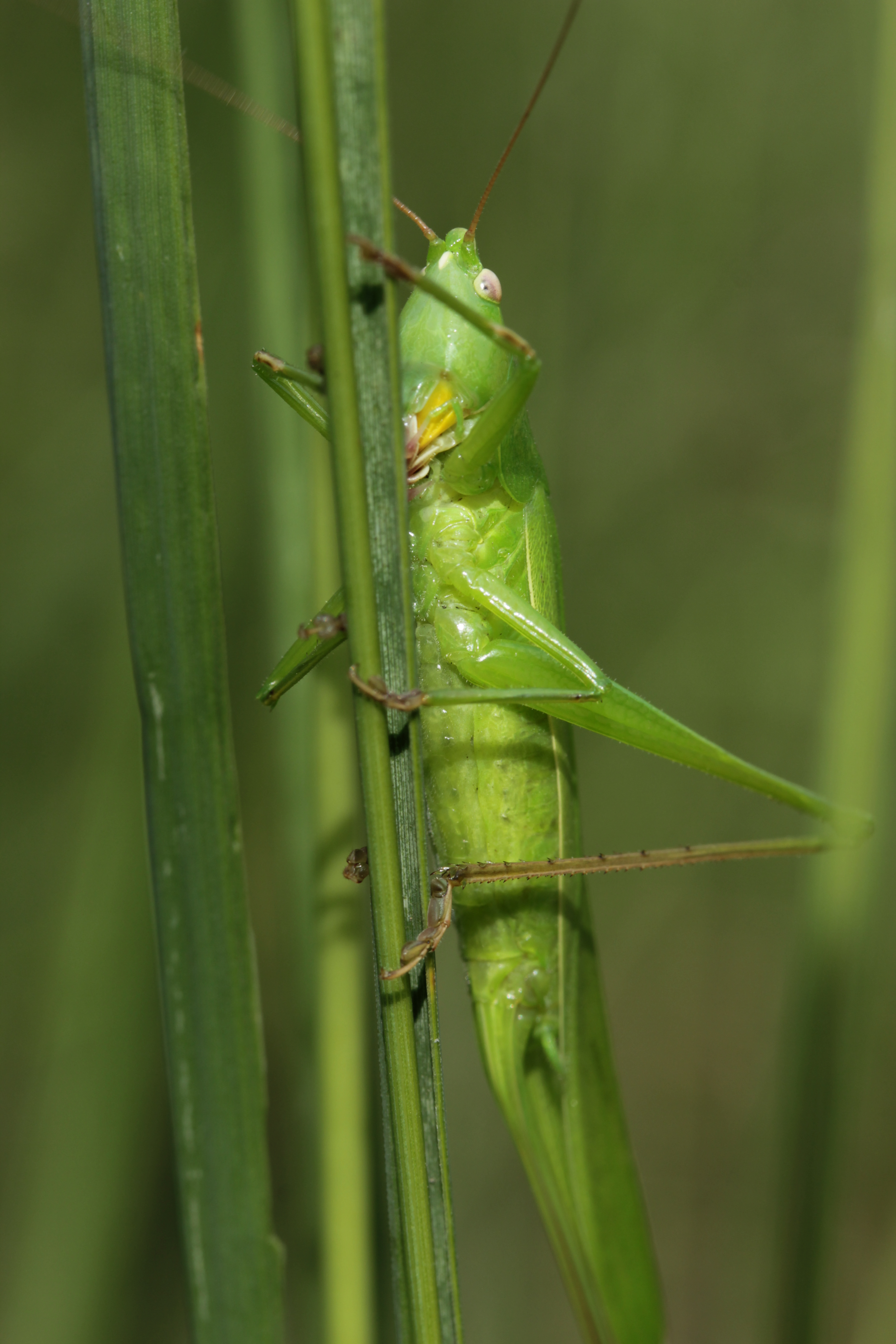 Large Conehead - Ruspolia nitidula